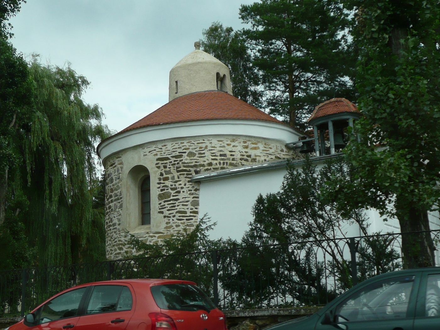 Románská rotunda v Plavči, okres Znojmo.